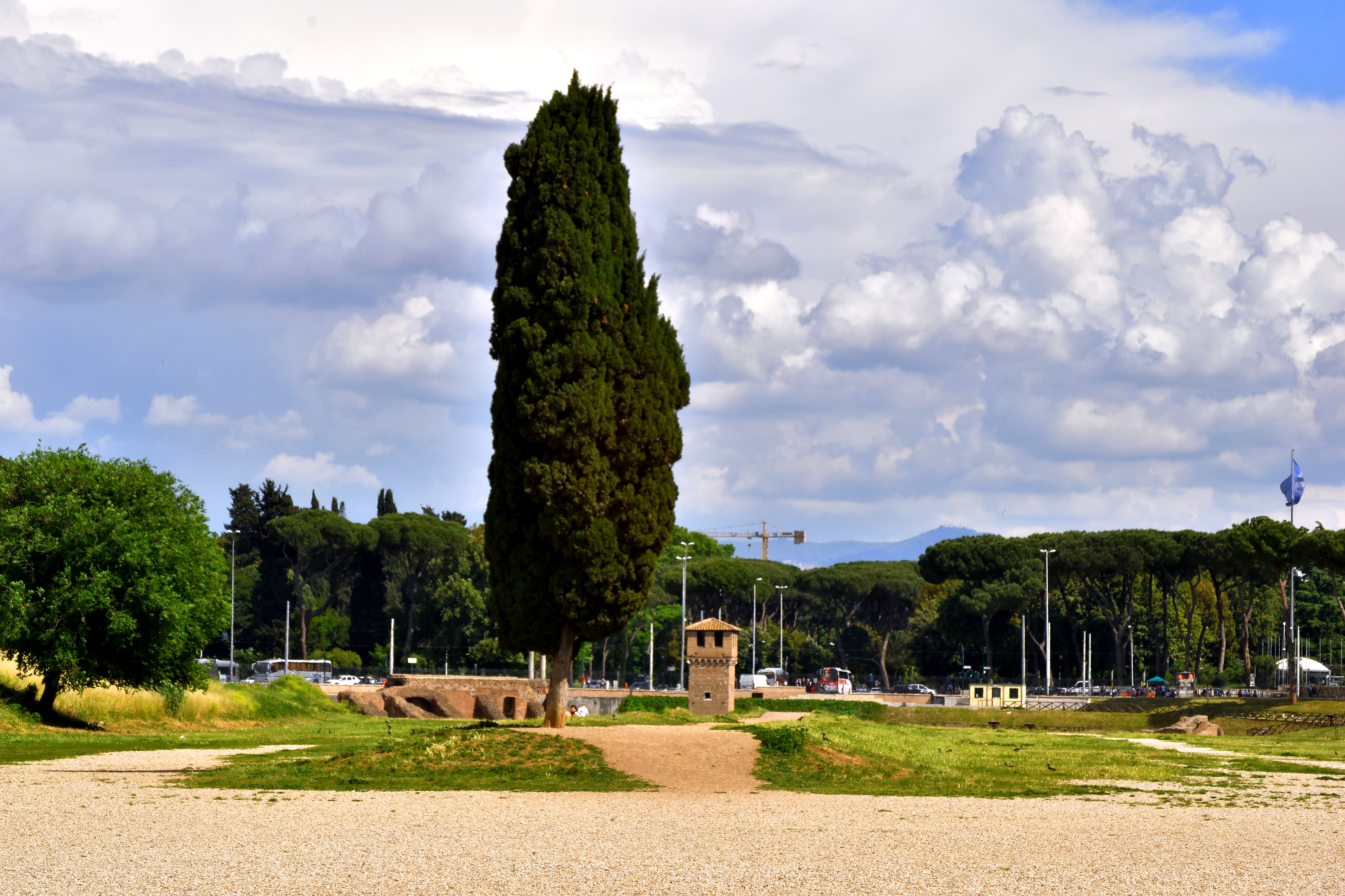 Das heutige Gelände des Circus Maximus an der Nordwestkurve